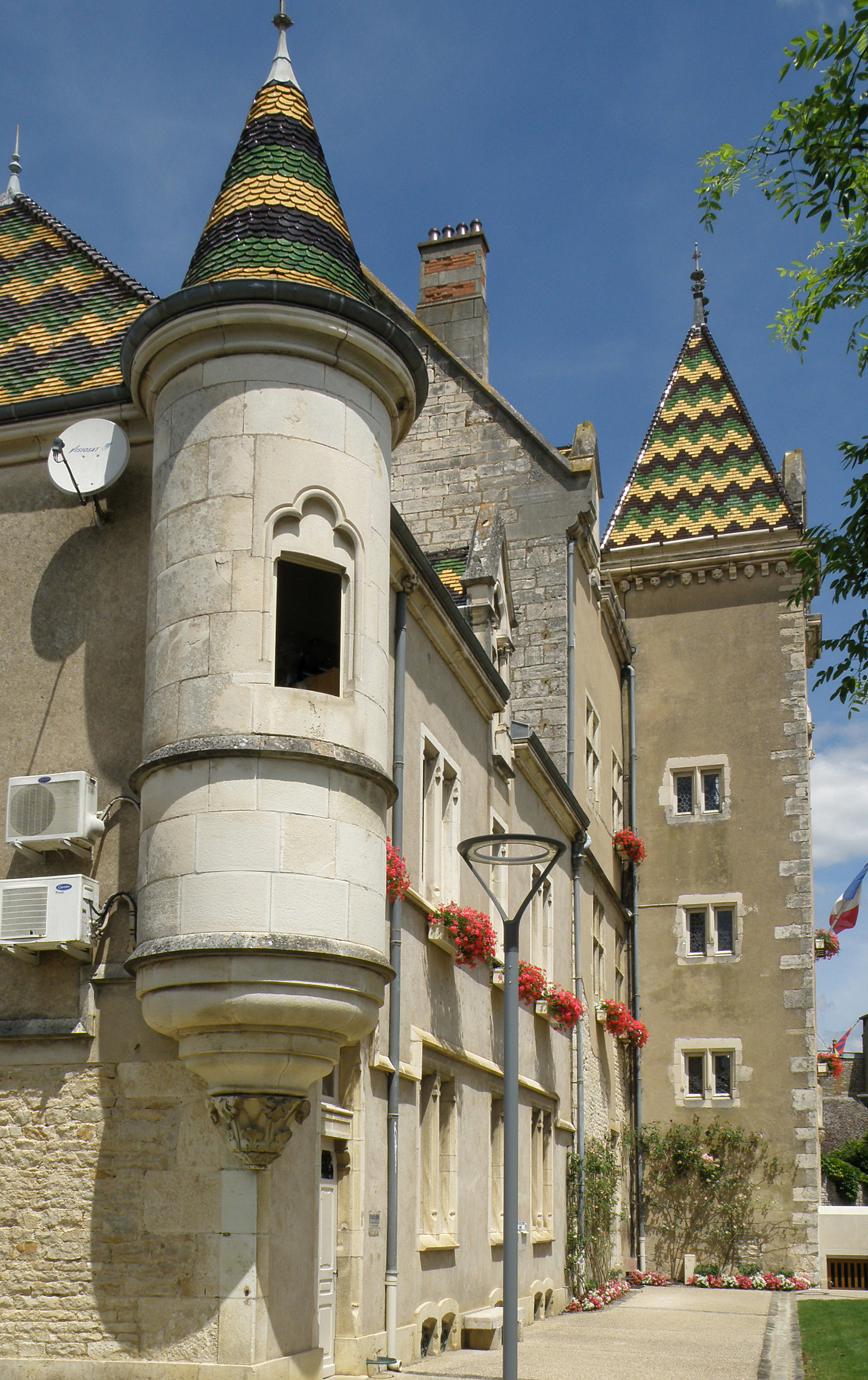 Meursault (Côte-d'Or, Bourgogne, France). Ancien château-fort, aujourd'hui hôtel de ville.